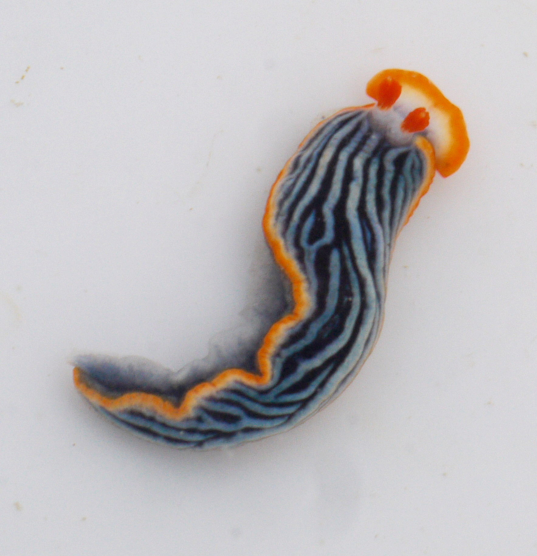 Dermatobranchus striatellus：サメジマオトメウミウシ 2011/07/03 和歌山県すさみ町：Susami Town, Wakayama Pref. Japan